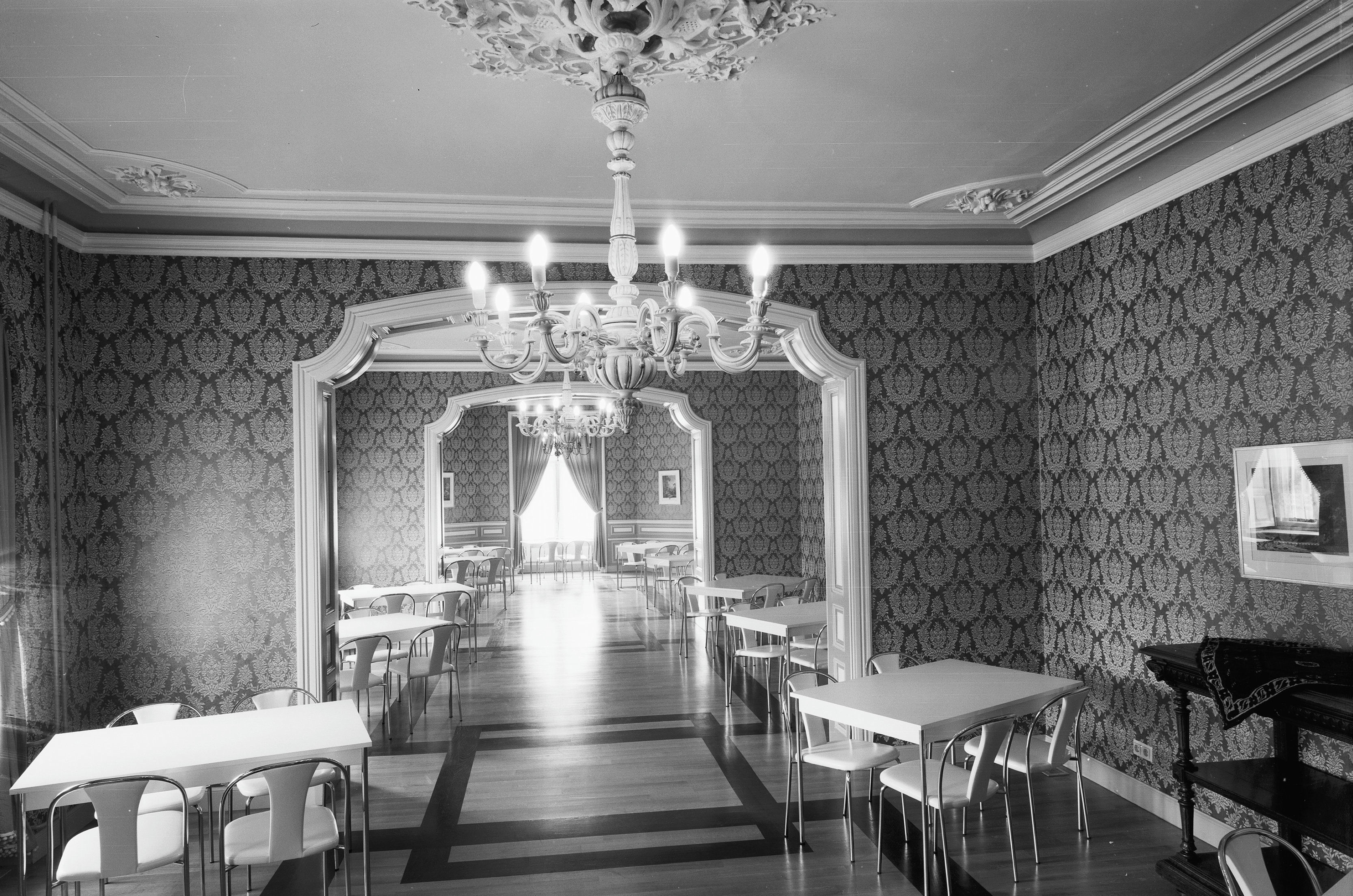 Kasteel Bethlehem: interieur